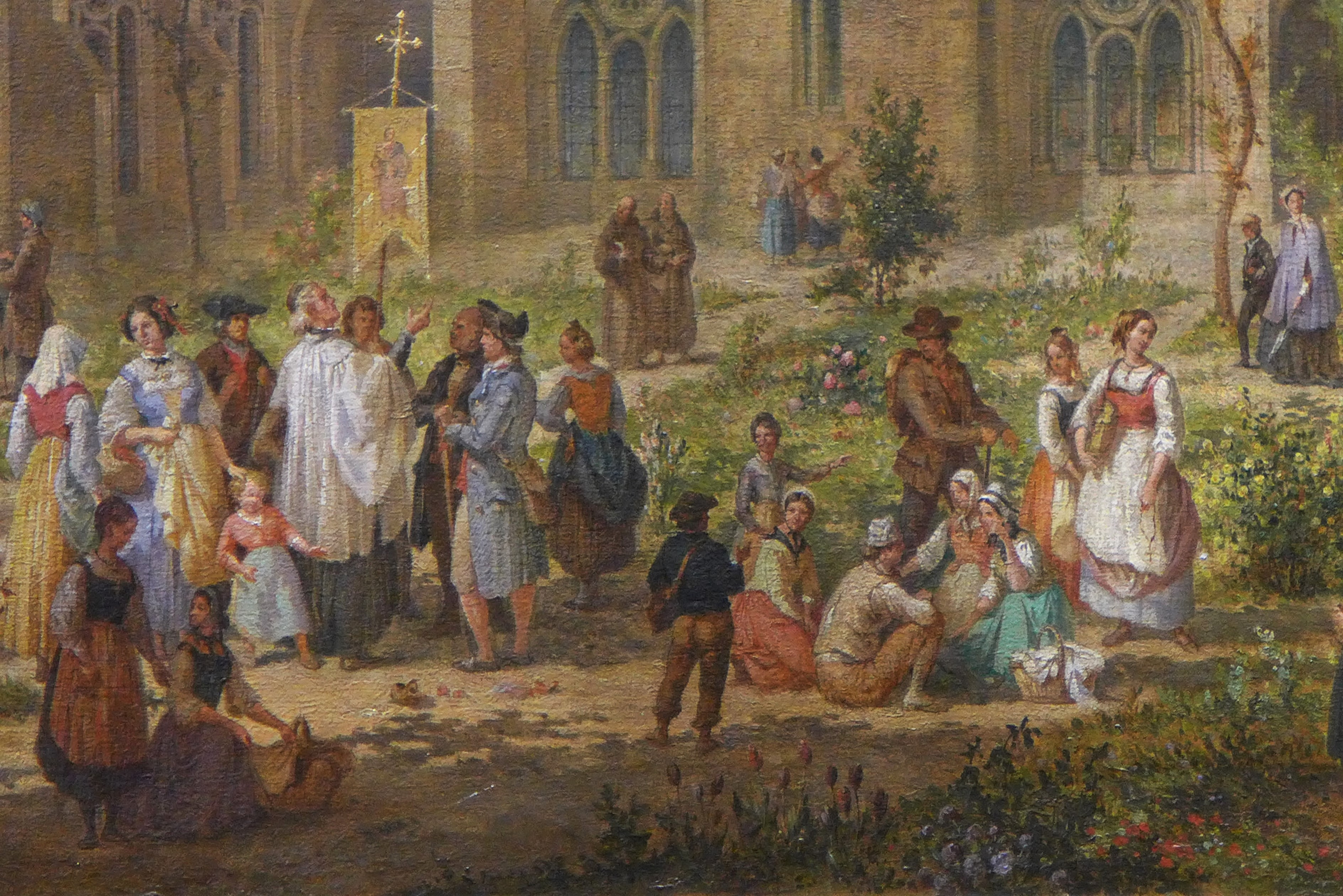 August Migette (1802 in Trier – 1884 in Metz), Pilger im Kreuzganggarten des Trierer Domes um 1870, Ausschnitt, Museum Cour´dor, Metz